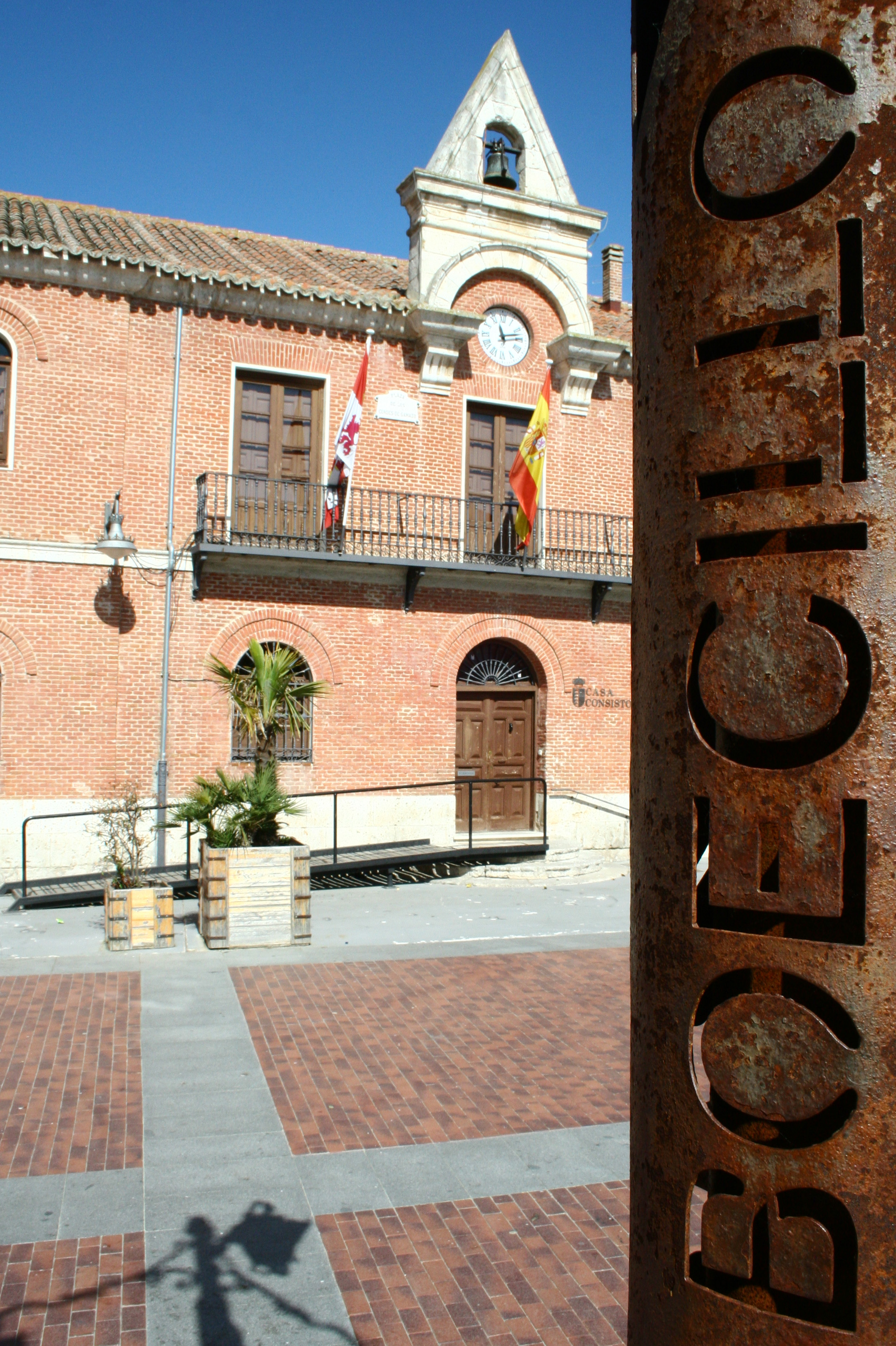 Ayuntamiento de Boecillo (Castilla y León) y farola informativa.